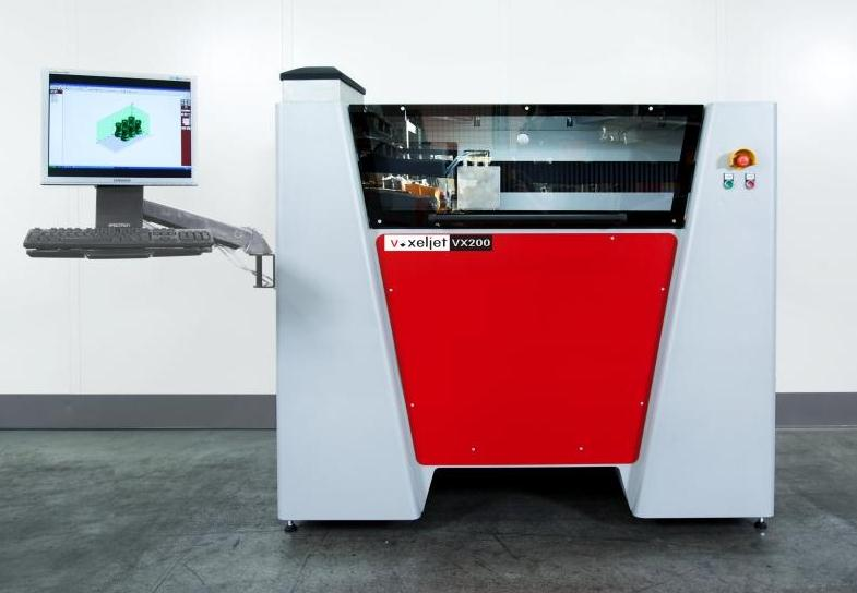 voxeljet 3D-Drucksystem VX200